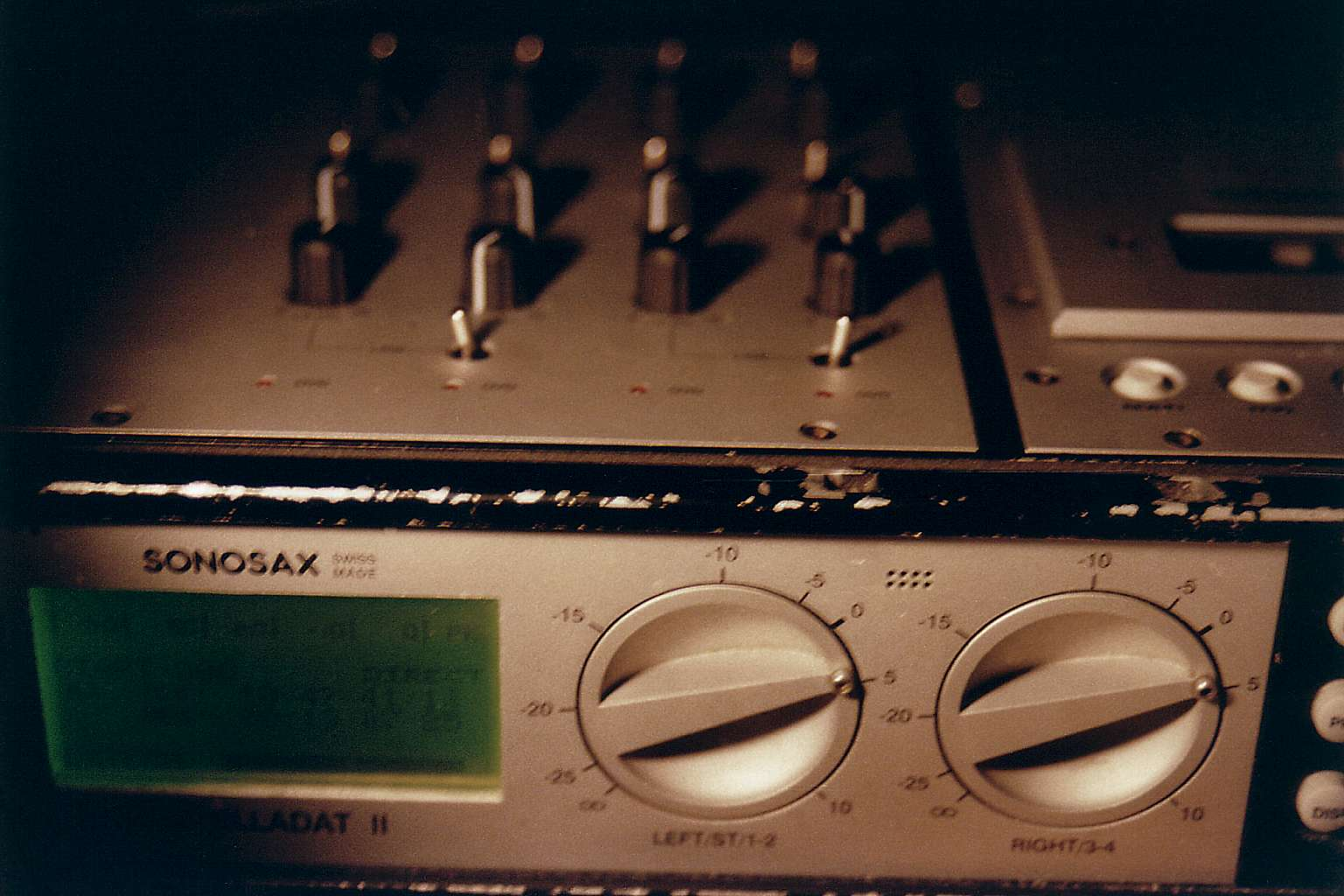 Sonosax Stelladat II DAT-recorder (detail)